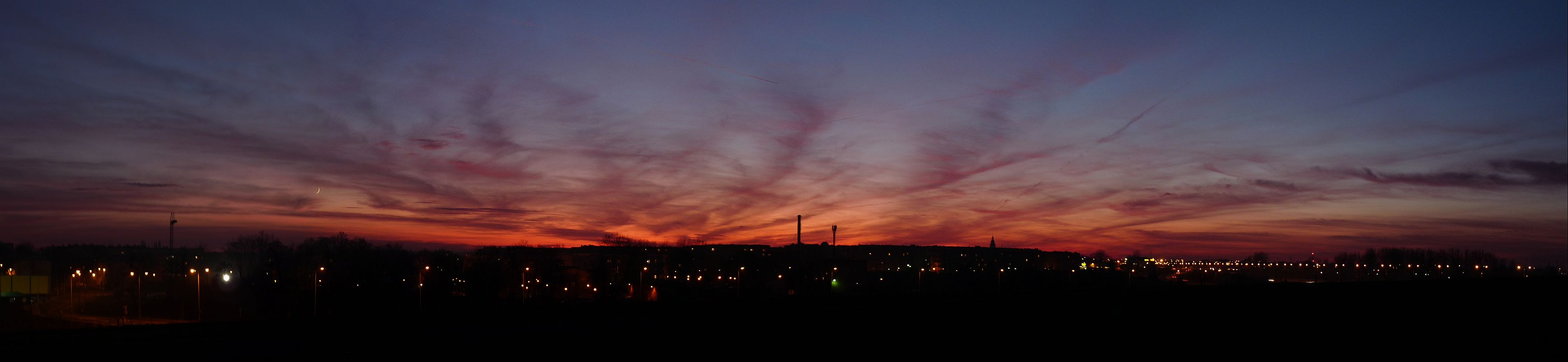 Panorama ze Wzgórza Papieskiego - Luboń